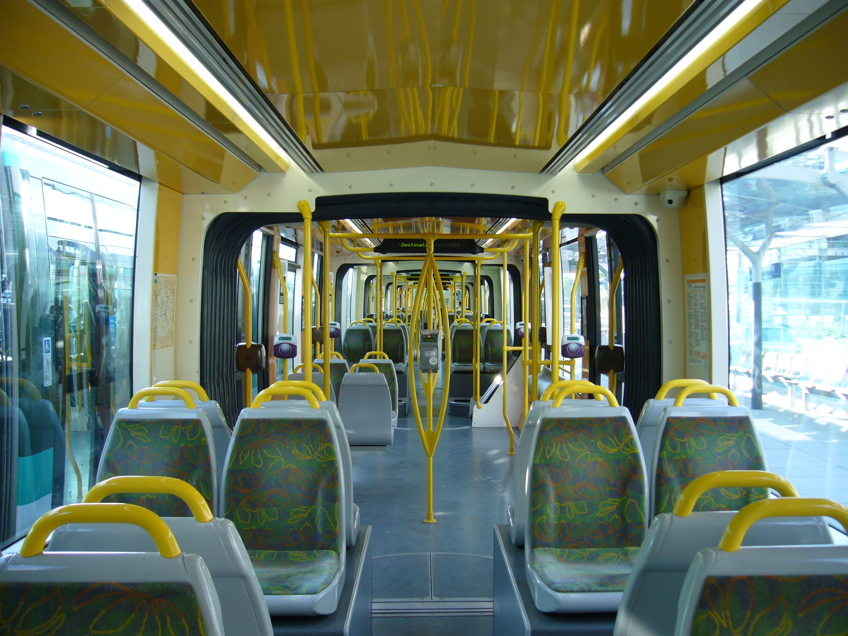 Intérieur d'un Citadis 402 de la ligne 3 du tramway d'Île-de-France.